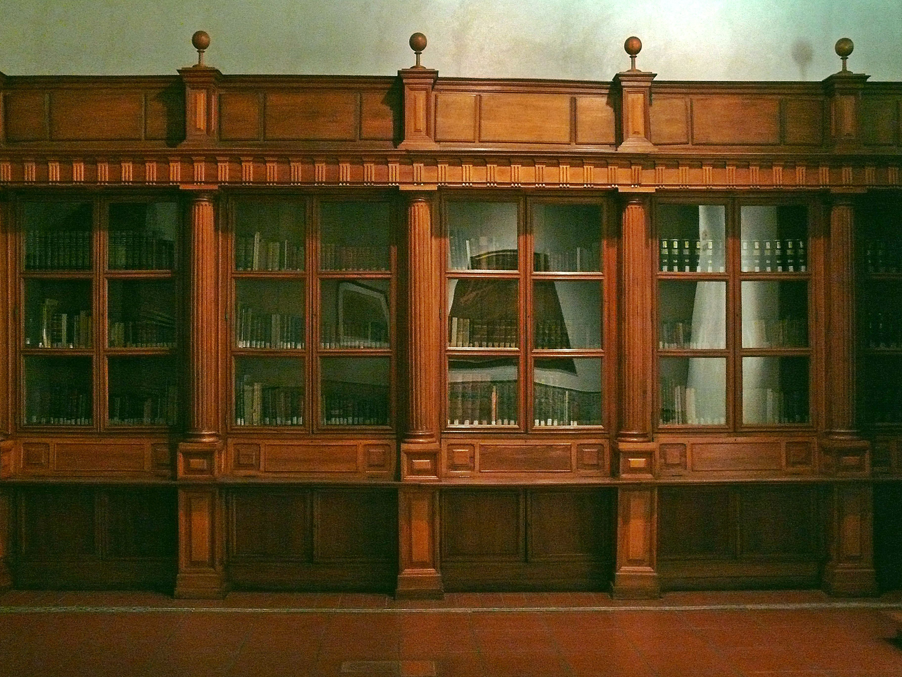 Bücherschrank in der Sinagoga del Transito, Toledo